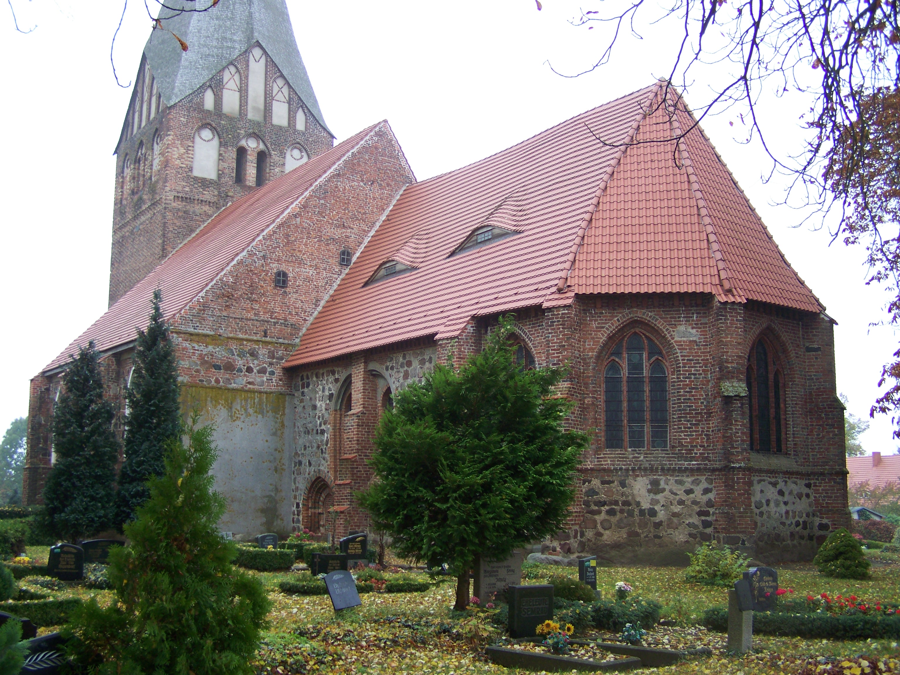 Kirche in Wusterhusen, Chor und Schiff